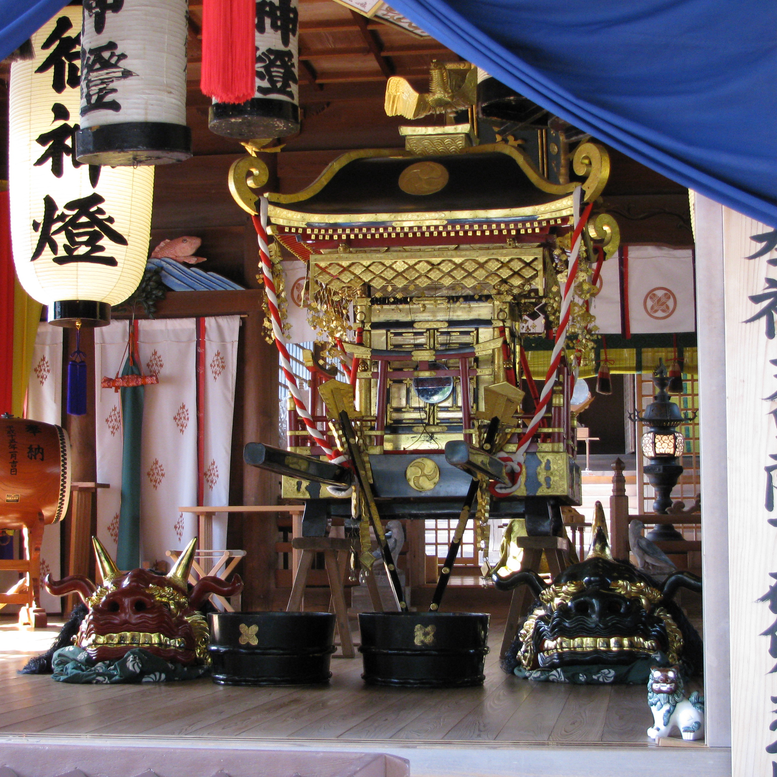 Mikoshi and Shishi of Suwa-jinja, Karatsu, Saga